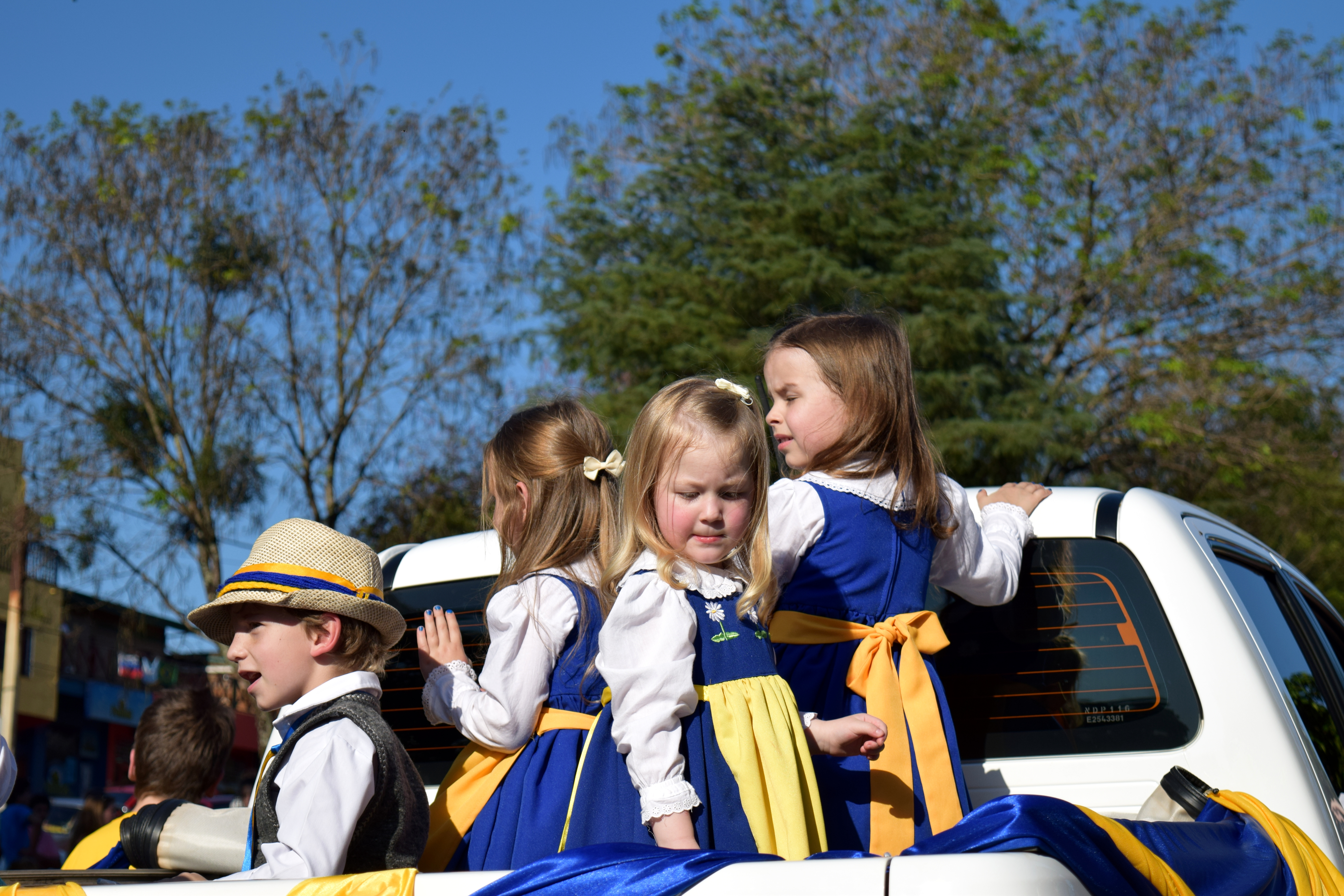 Desfile inaugural de la XXXV Fiesta Nacional del Inmigrante realizada en Septiembre de 2014 en Oberá, provincia de Misiones, Argentina.